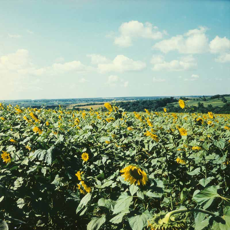 Near Anenii Noi - 2 (1972).